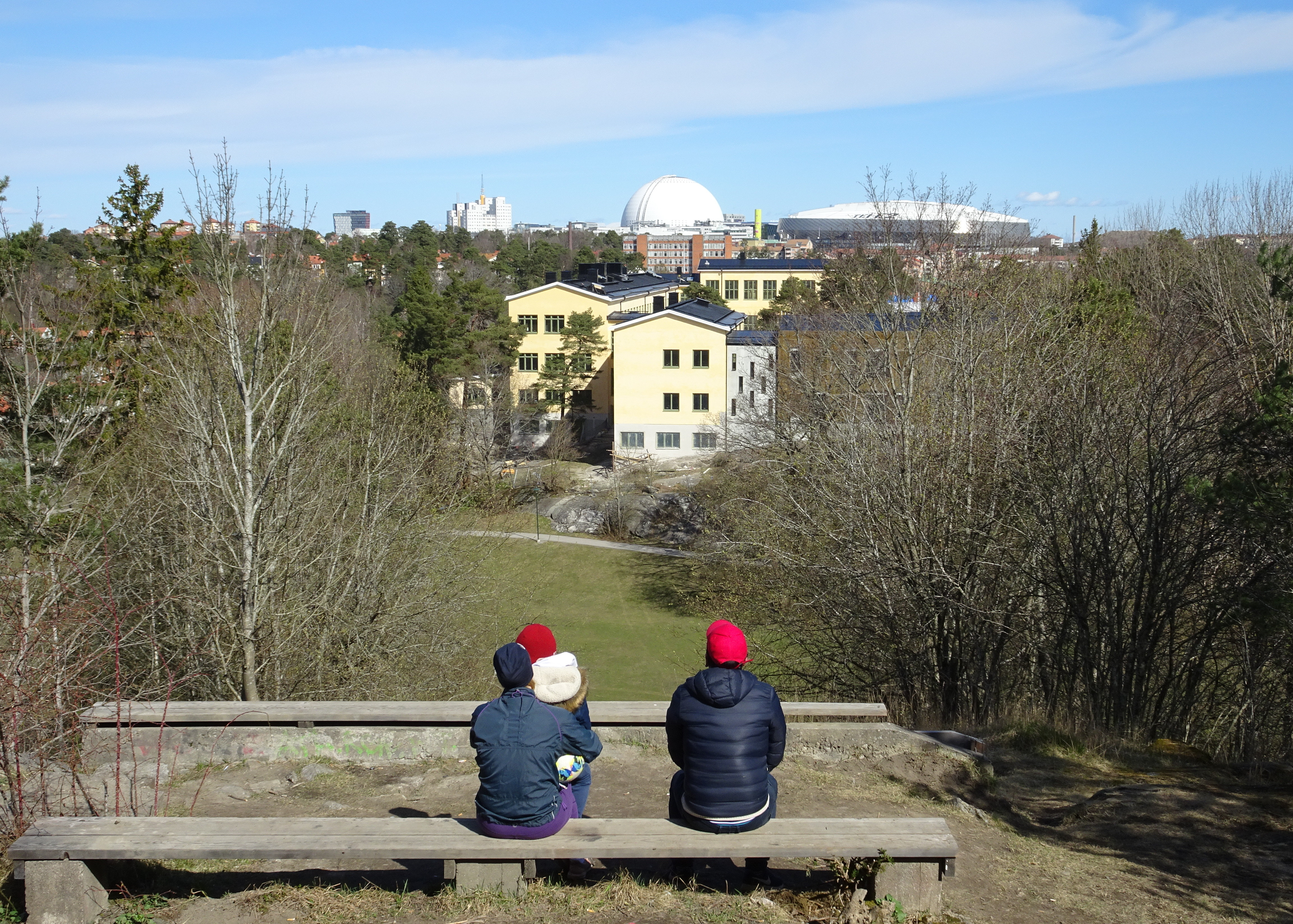 Enskdefältets före detta hoppbacke utsiktsplats. I bakgrunden syns Enskedefältets skola och längst bort Globen och Tele2 Arena.